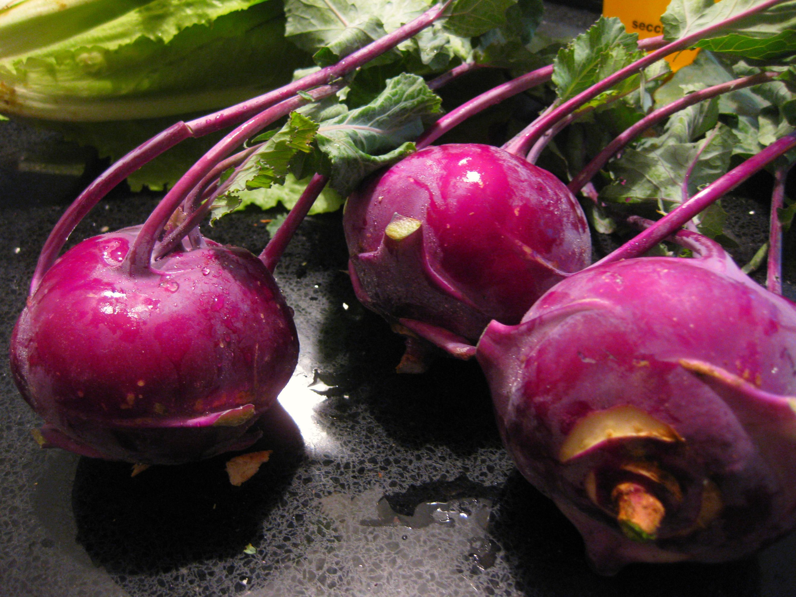 A Kohlrabi